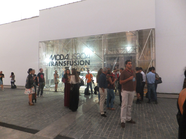 Pátio da Galé, Lisbon • 08.10.2011 Photo: Sara Alves Corceiro